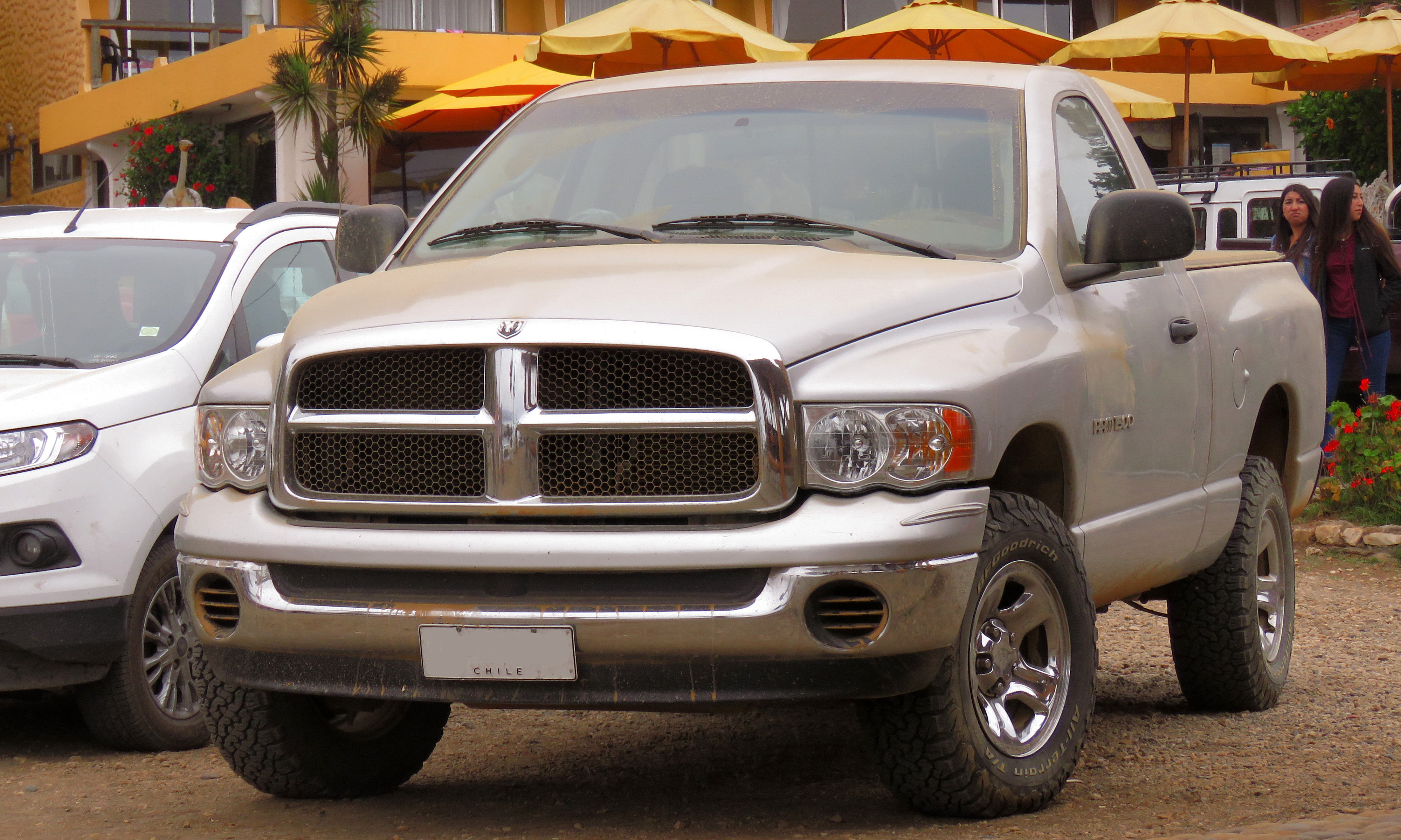 Dodge Ram 1500 SLT 2005